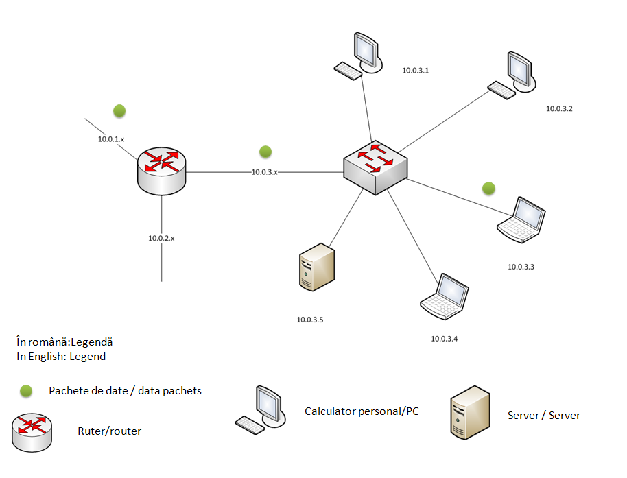 Ilustrarea procesului de rutare al unui pachet de date. Primind un pachet de date cu destinația 10.0.3.3, ruterul îl trimite către comutatorul care răspunde de rețeaua 10.0.3.x care, la rândul lui, îl transmite calculatorului cu adresa 10.0.3.3